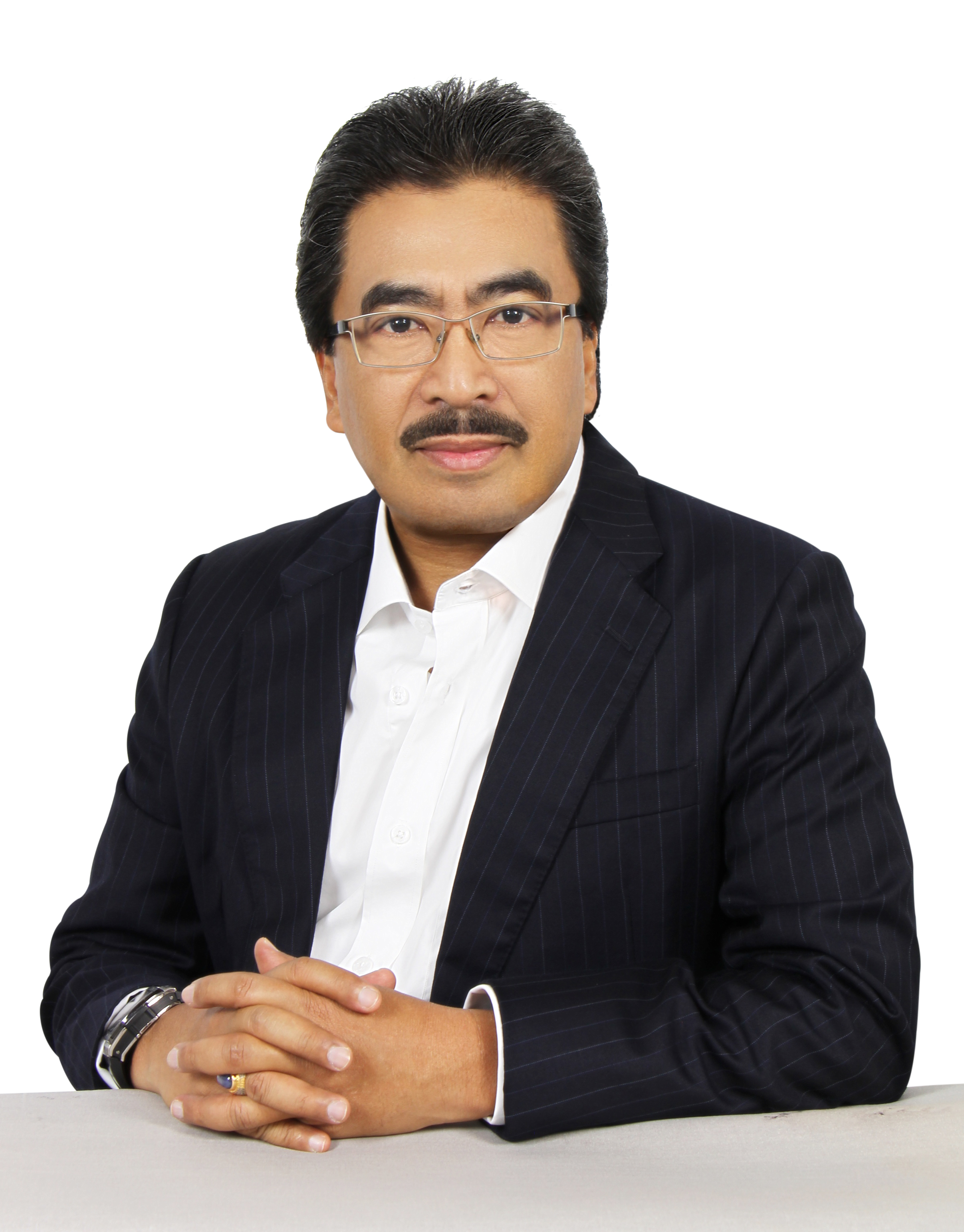 Gambar ini sesuai untuk kegunaan paparan percetakan Banner, bunting dan Backdrop